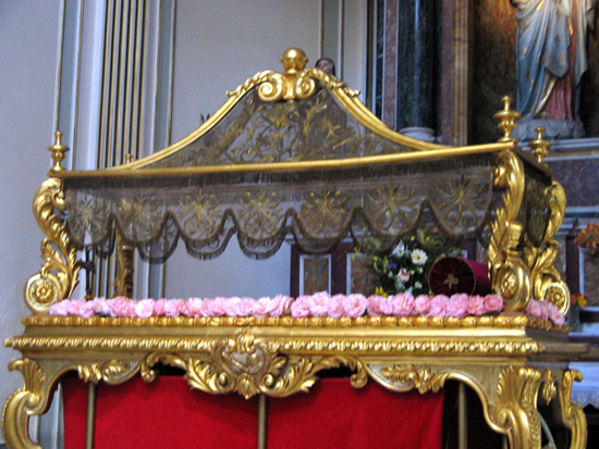 Cataletto del Cristo Morto - Zafferana Etnea (CT), Chiesa Madre - Foto D. Pennisi